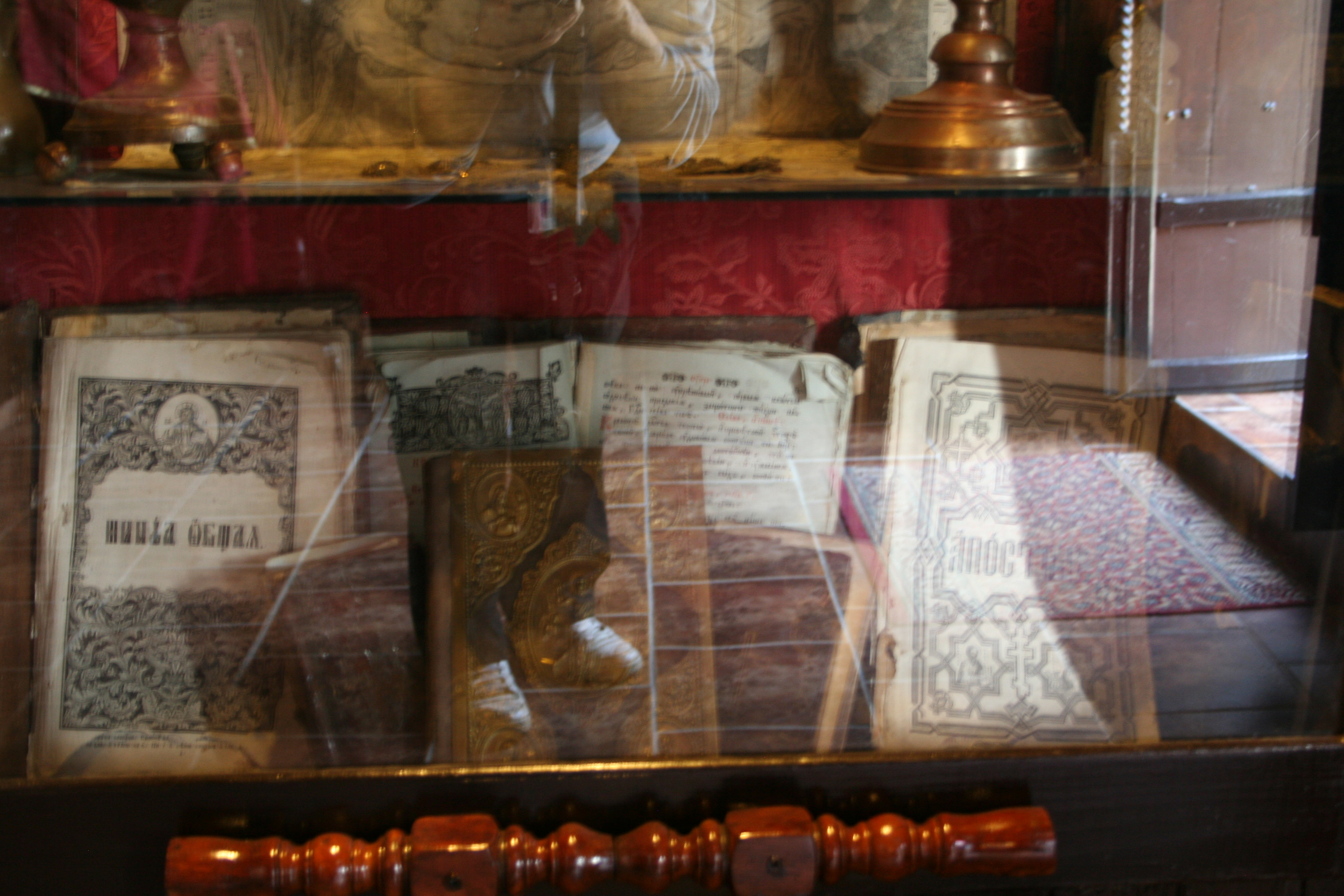 Crkva Uspenja Presvete Bogorodice, Dobri potok, Krupanj